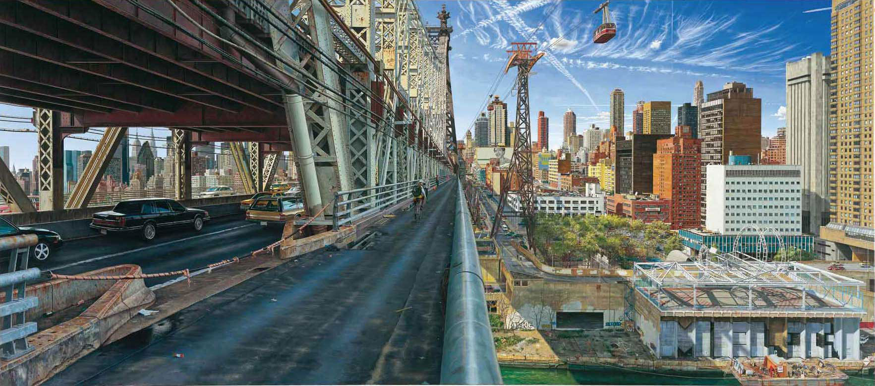 Andreas Orosz, "Queensboro Bridge", 1999-2001, Acryl auf Leinwand, 190 cm x 420 cm